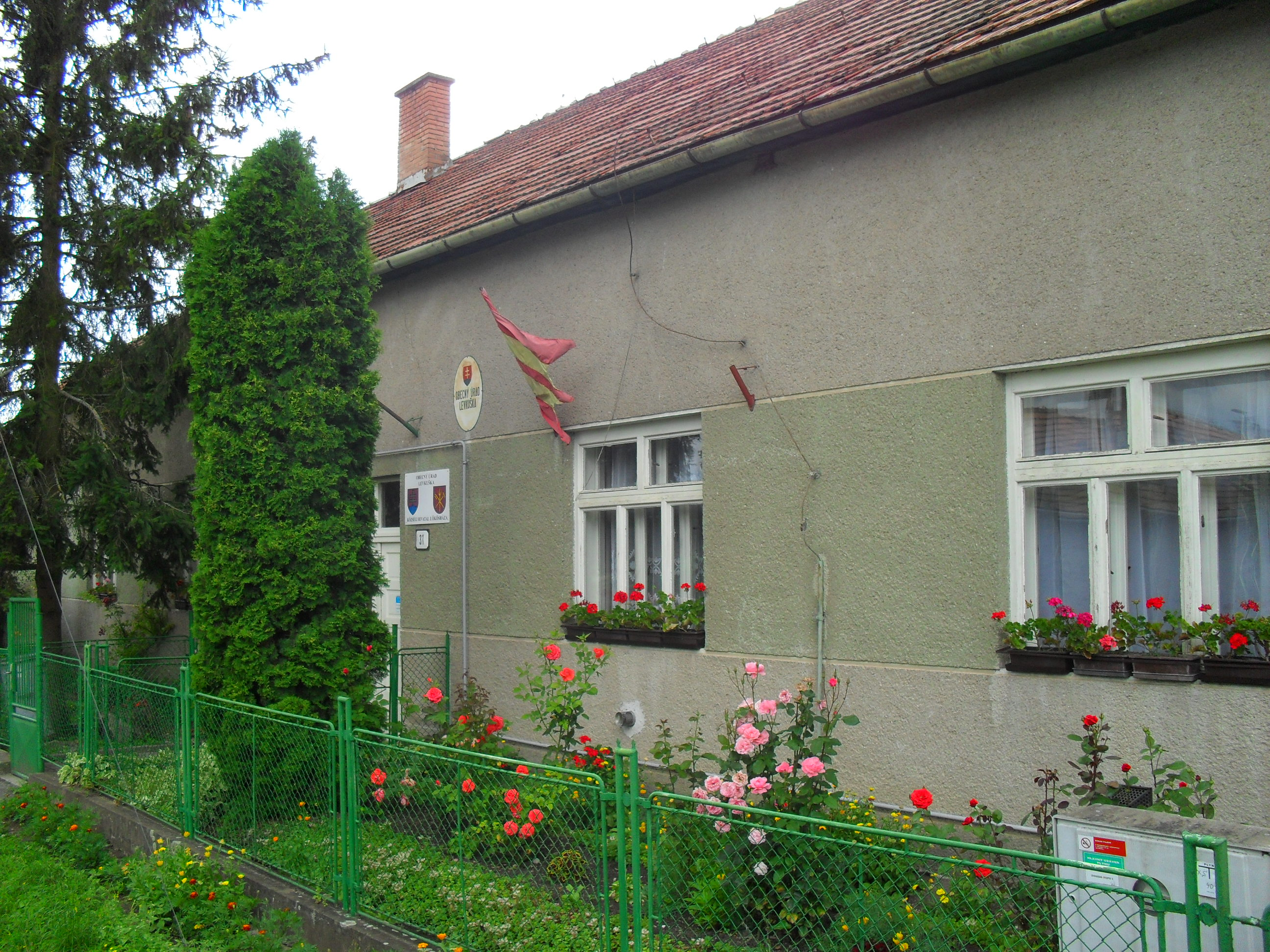 Lőkös - községi hivatal